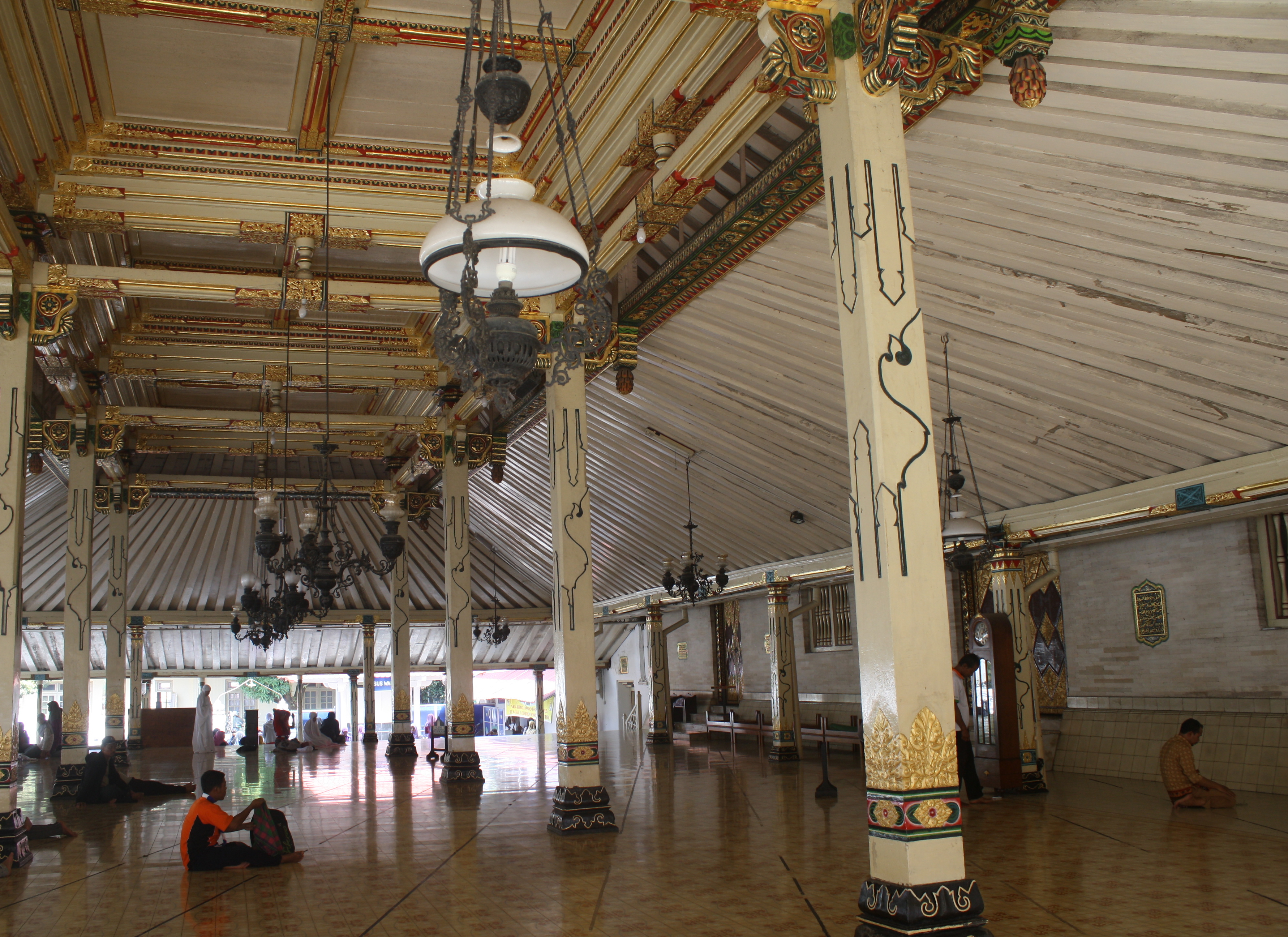 Serambi yang terdapat pada Masjid Agung Yogyakarta